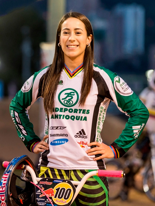 Mariana Pajón, triple medallista olímpica colombiana